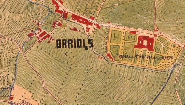 Els Orriols el 1883 (el nord està a la dreta).